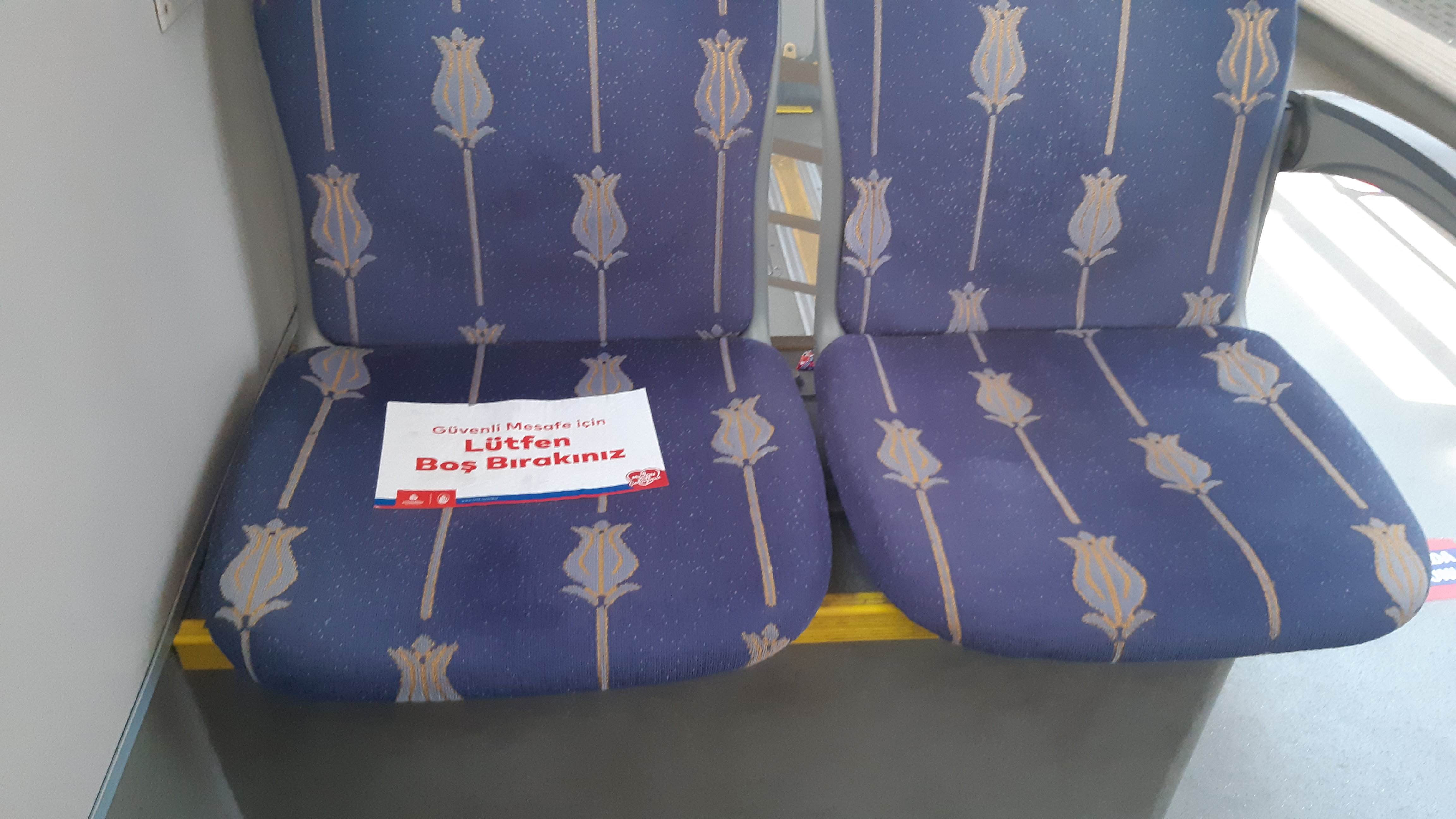 İstanbul'daki otobüslerde bulunan sosyal mesafe uyarısı